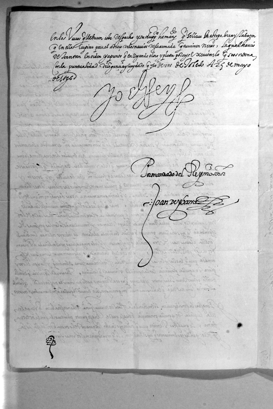 verso of the letter